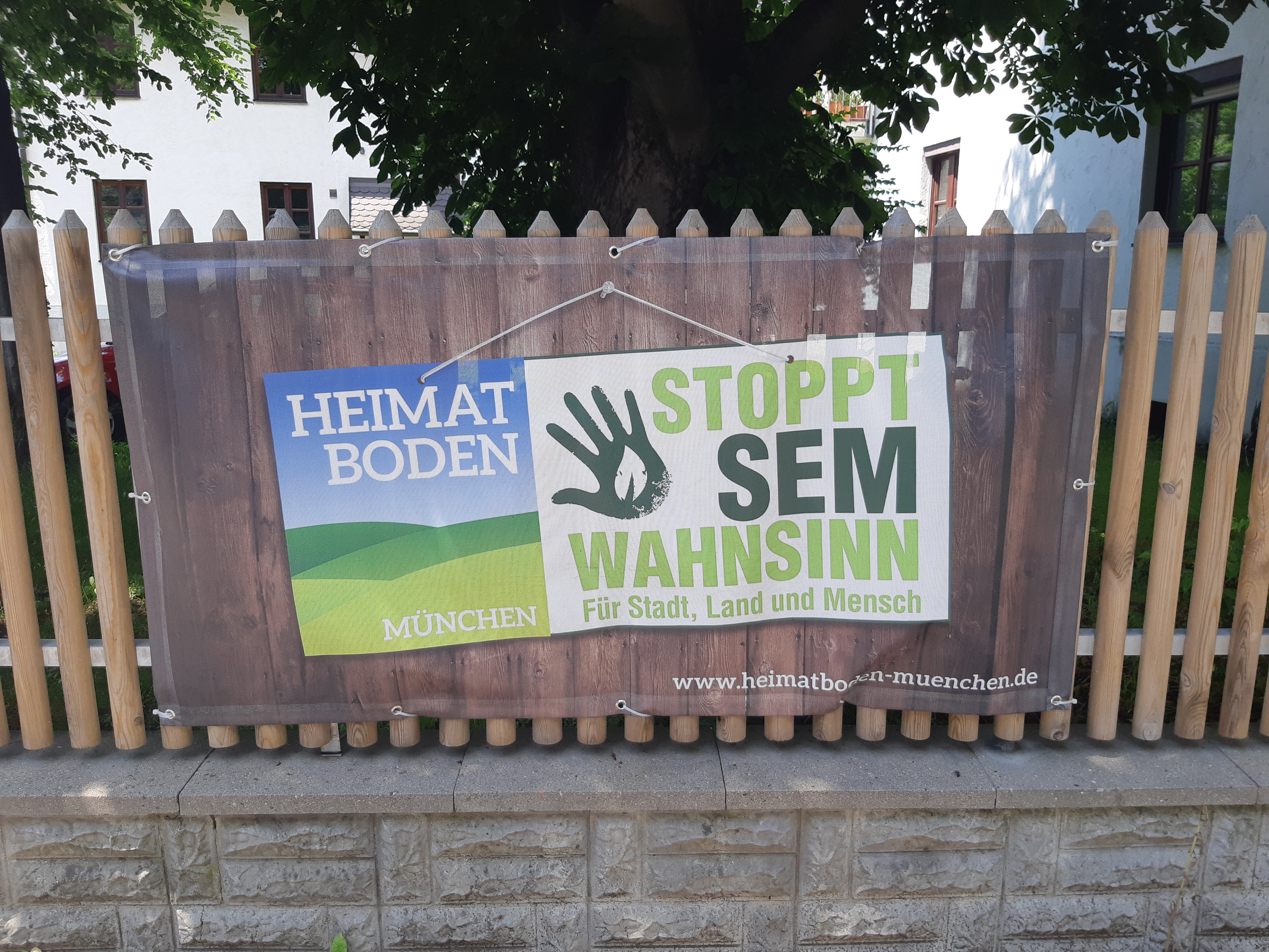 Plakat Stoppt SEM Wahnsinn